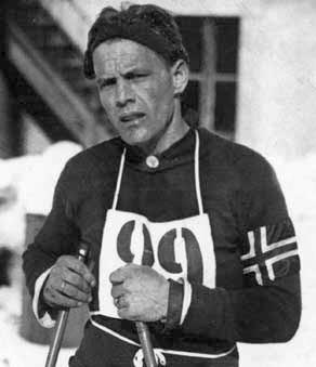 Thorleif Haug (28 September 1894 – 12 December 1934)